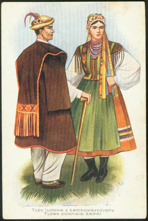 Poleszuk.